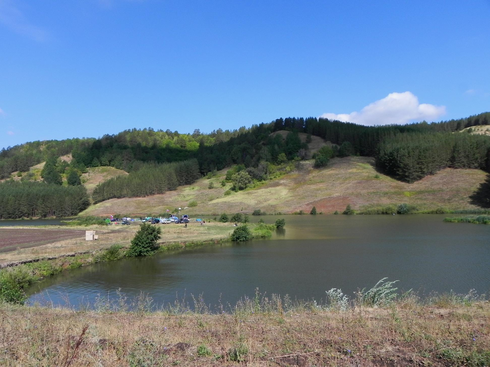 Озеро Багряж